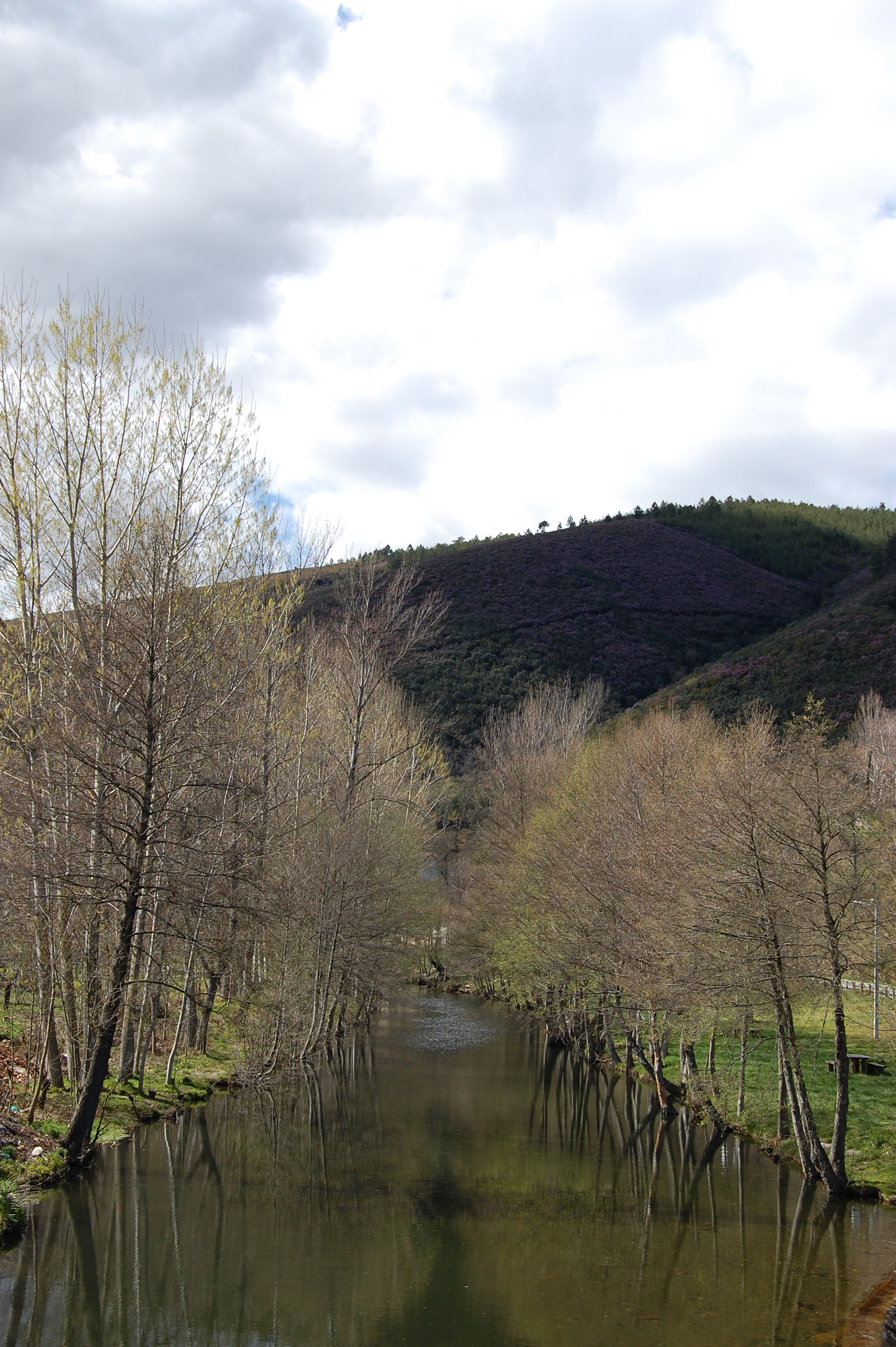 A freguesia de França, concelho de Bragança, Portugal.